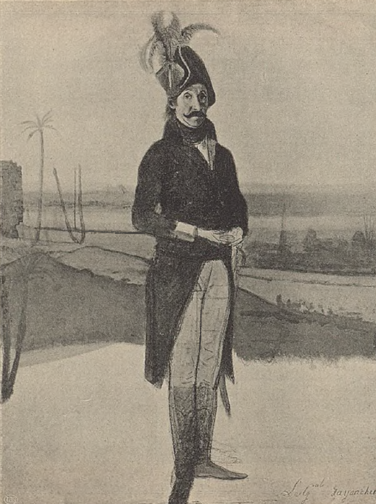 "Le général Zayonchek" : portrait du général polonais Józef Zajączek (1752-1826), pendant la campagne d'Égypte.